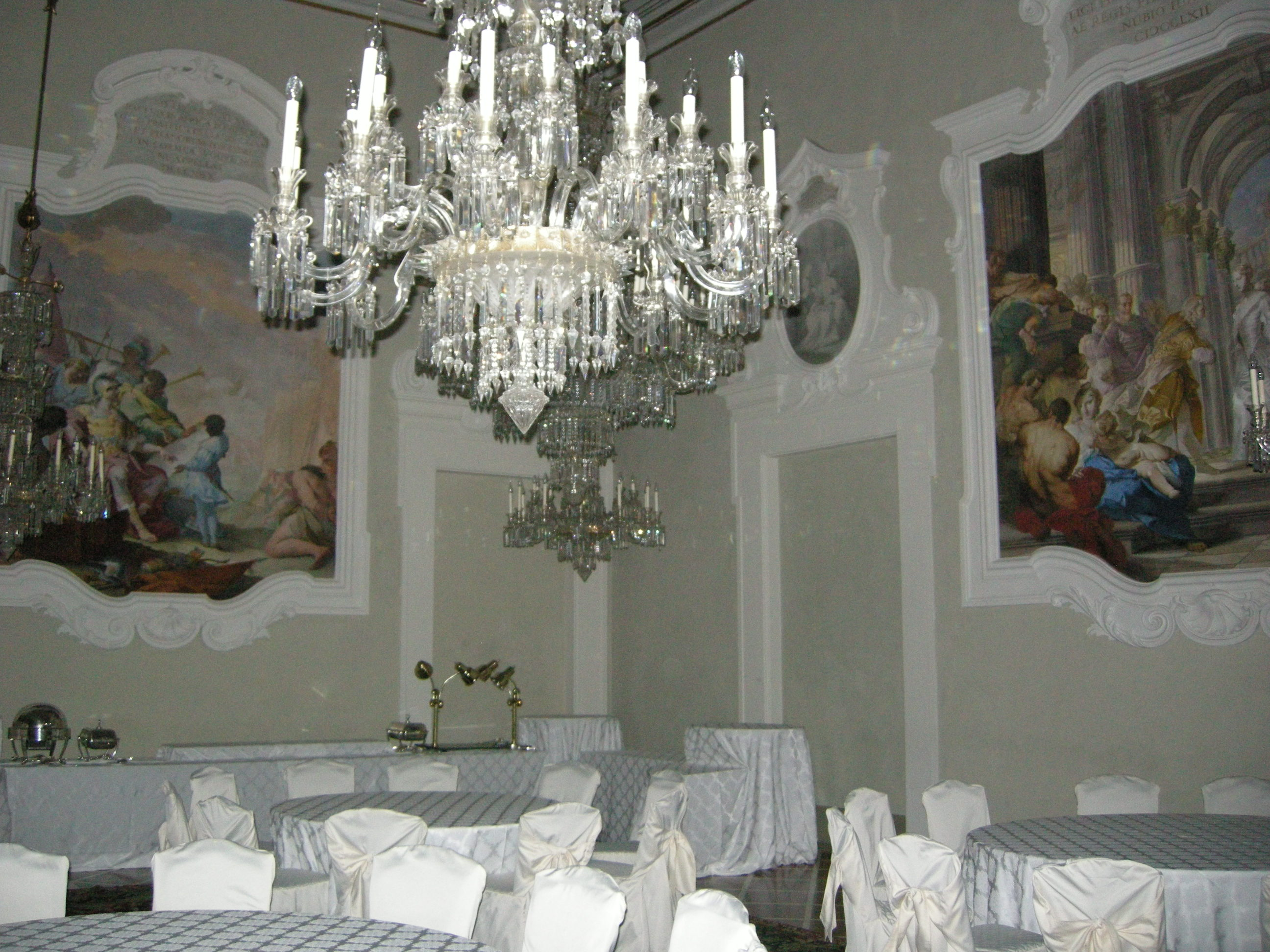 Palazzo della gheradesca, salone